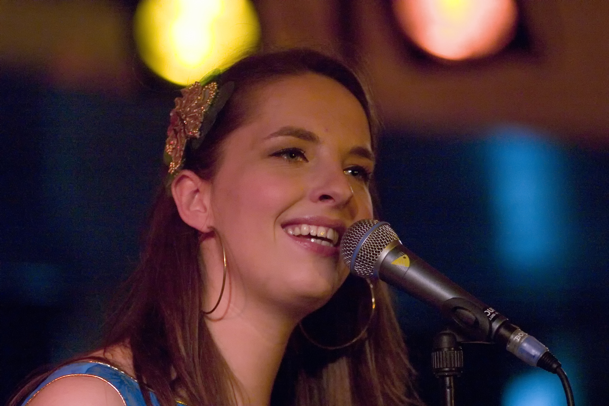 Renske Taminiau